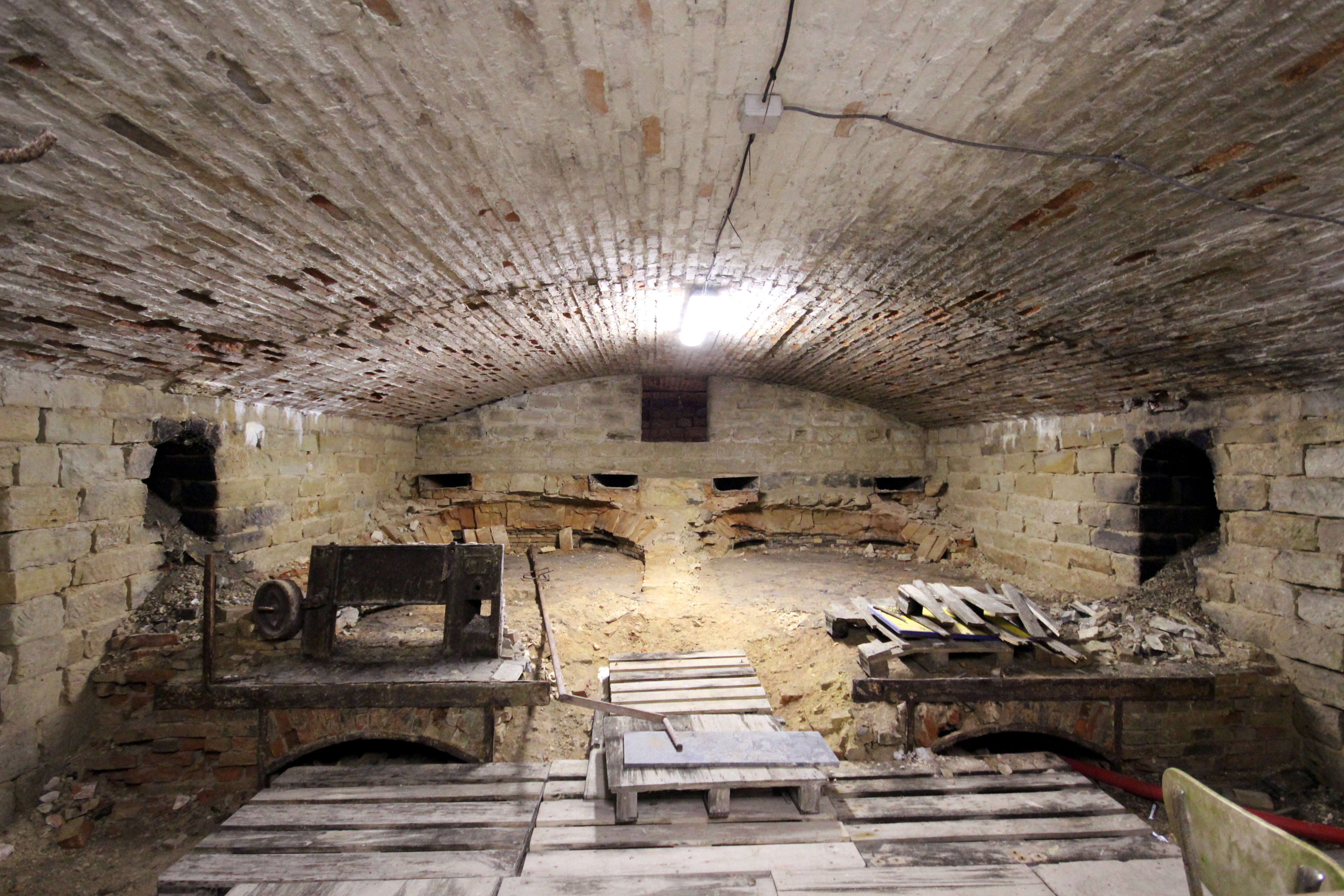 Le four à pain du fort de Roulon